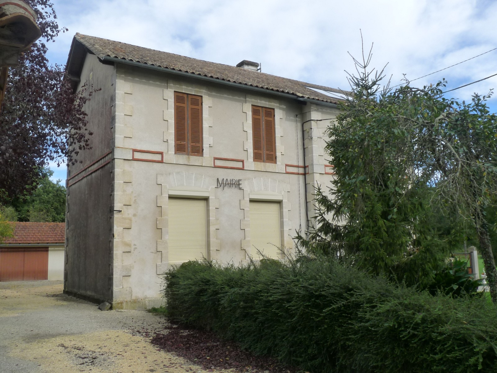 Mairie de Chaunac, Charente-Maritime, France